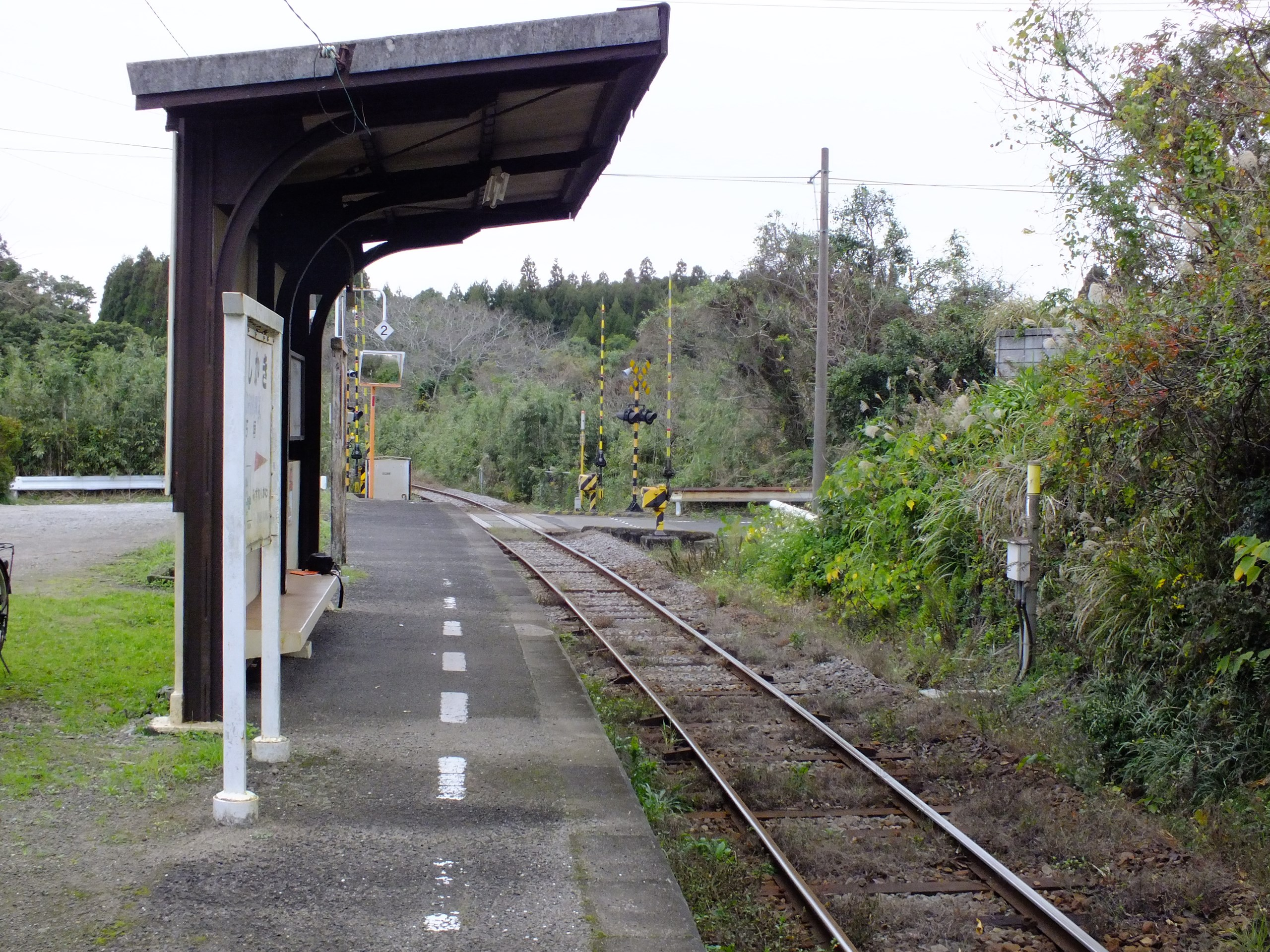 JR指宿枕崎線御領駅 鹿児島県南九州市 2018年12月